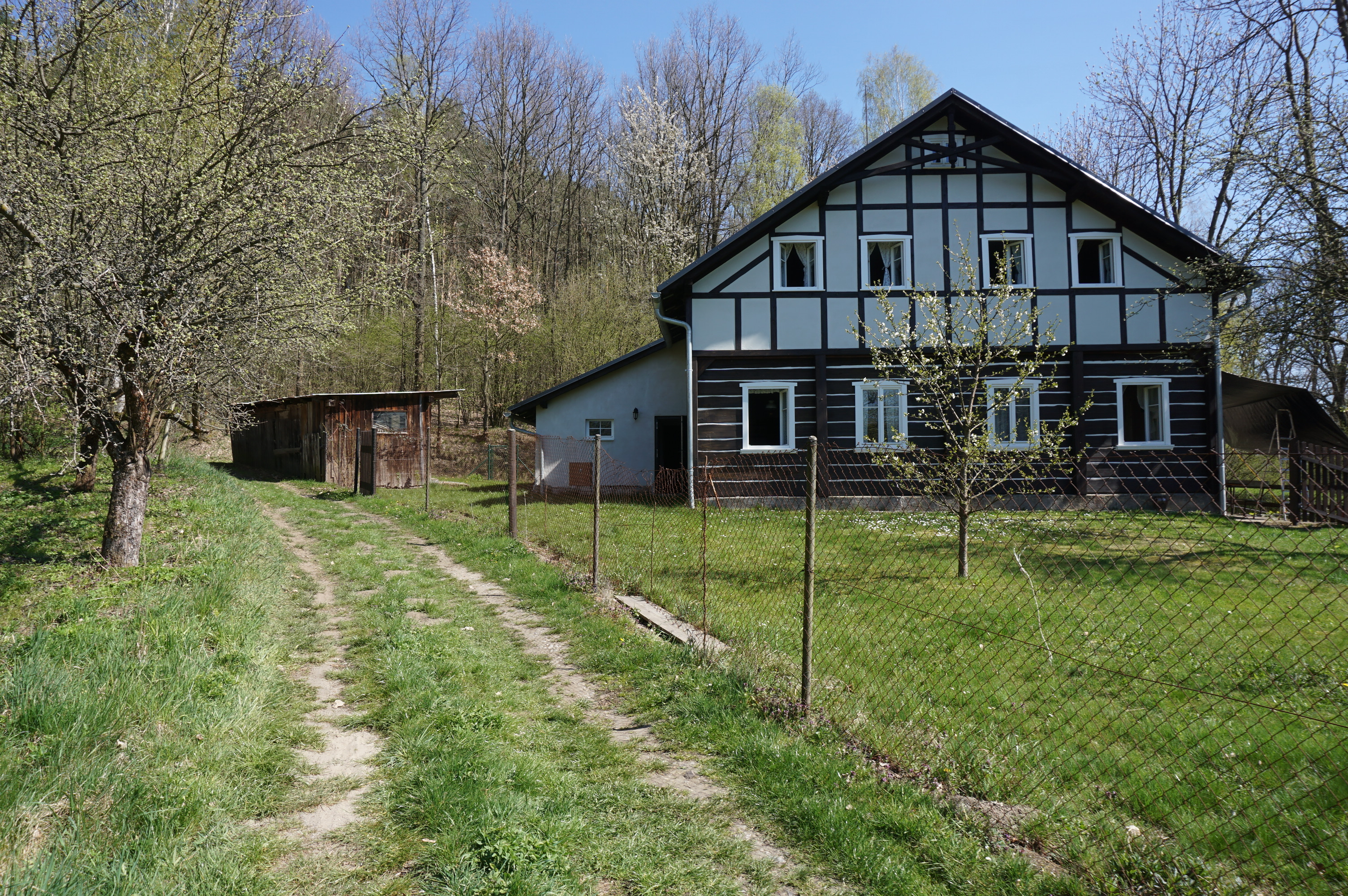 Lada v Podještědí - čp. 27